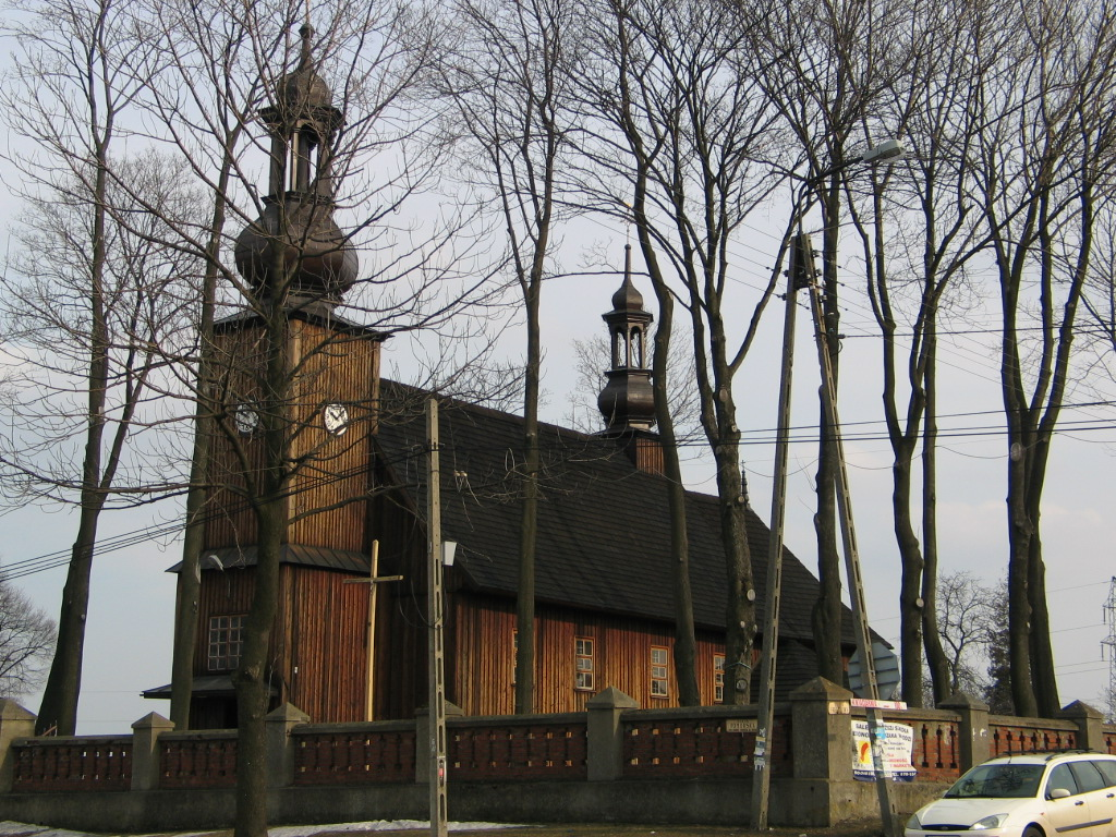 Kościół św. Doroty przy ulicy Pomorskiej 445 w Łodzi